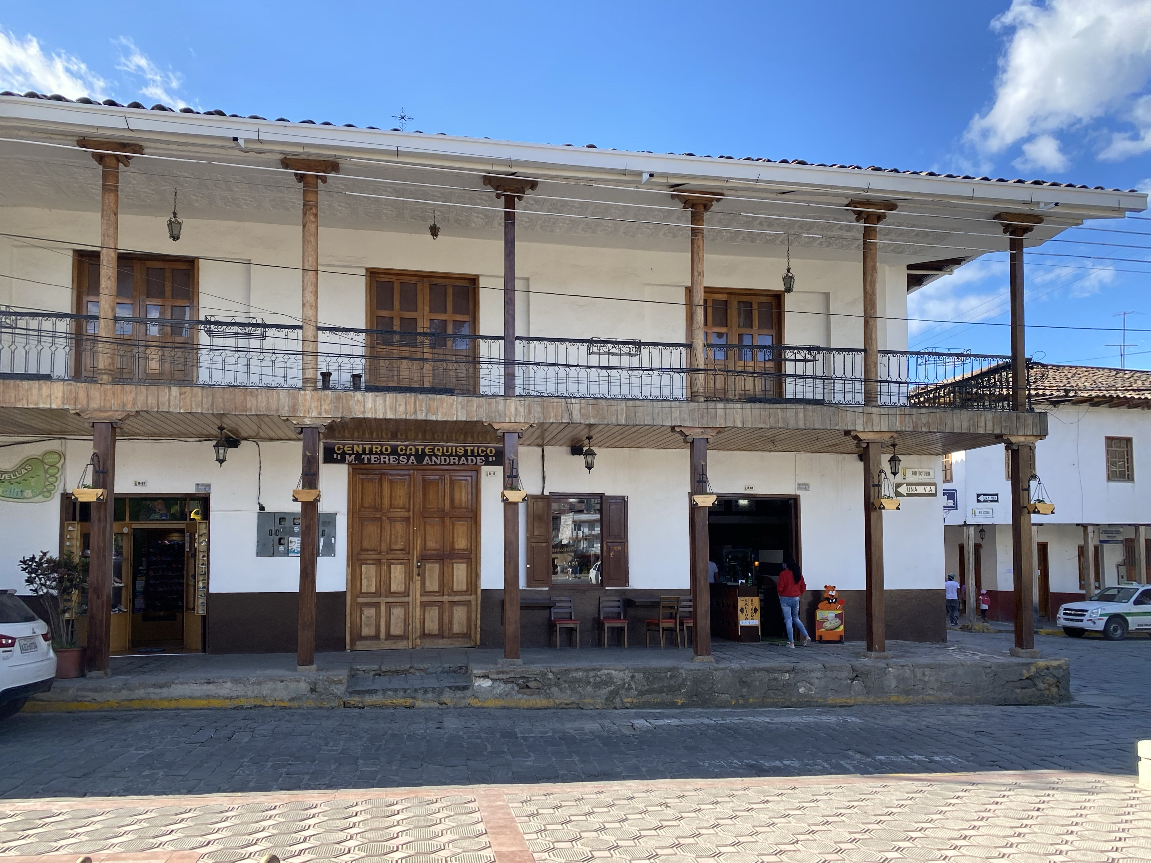 Casa ubicada frente al parque central 10 de Agosto en Gualaceo